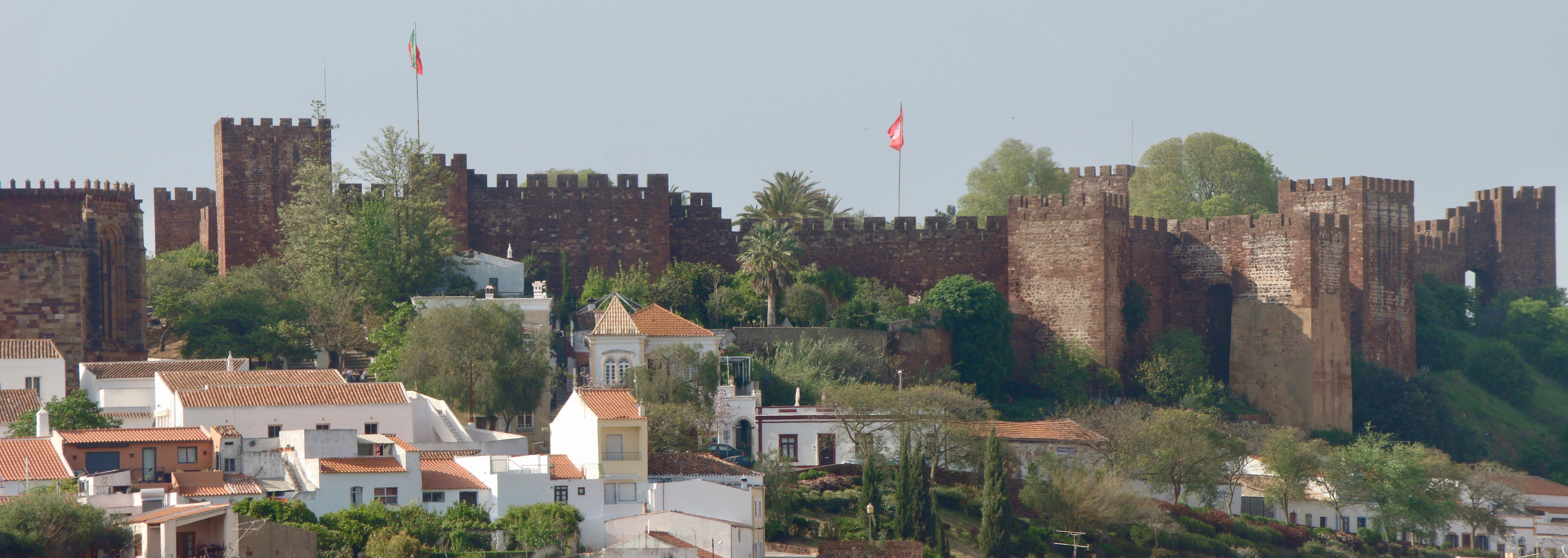 Vista panorâmica do Castelo de Silves. 26-04-2018.